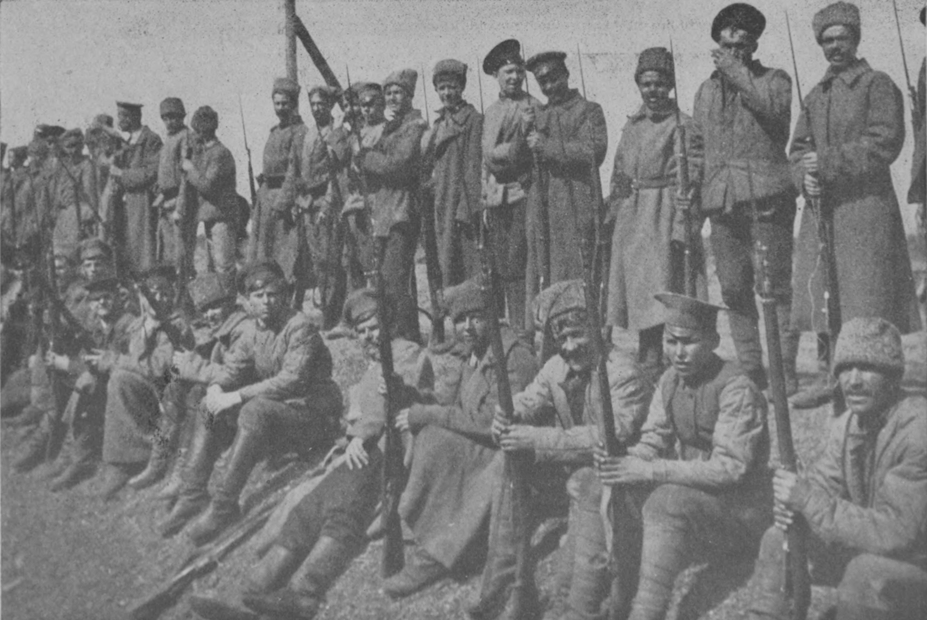 Tropas del Ejército Rojo.